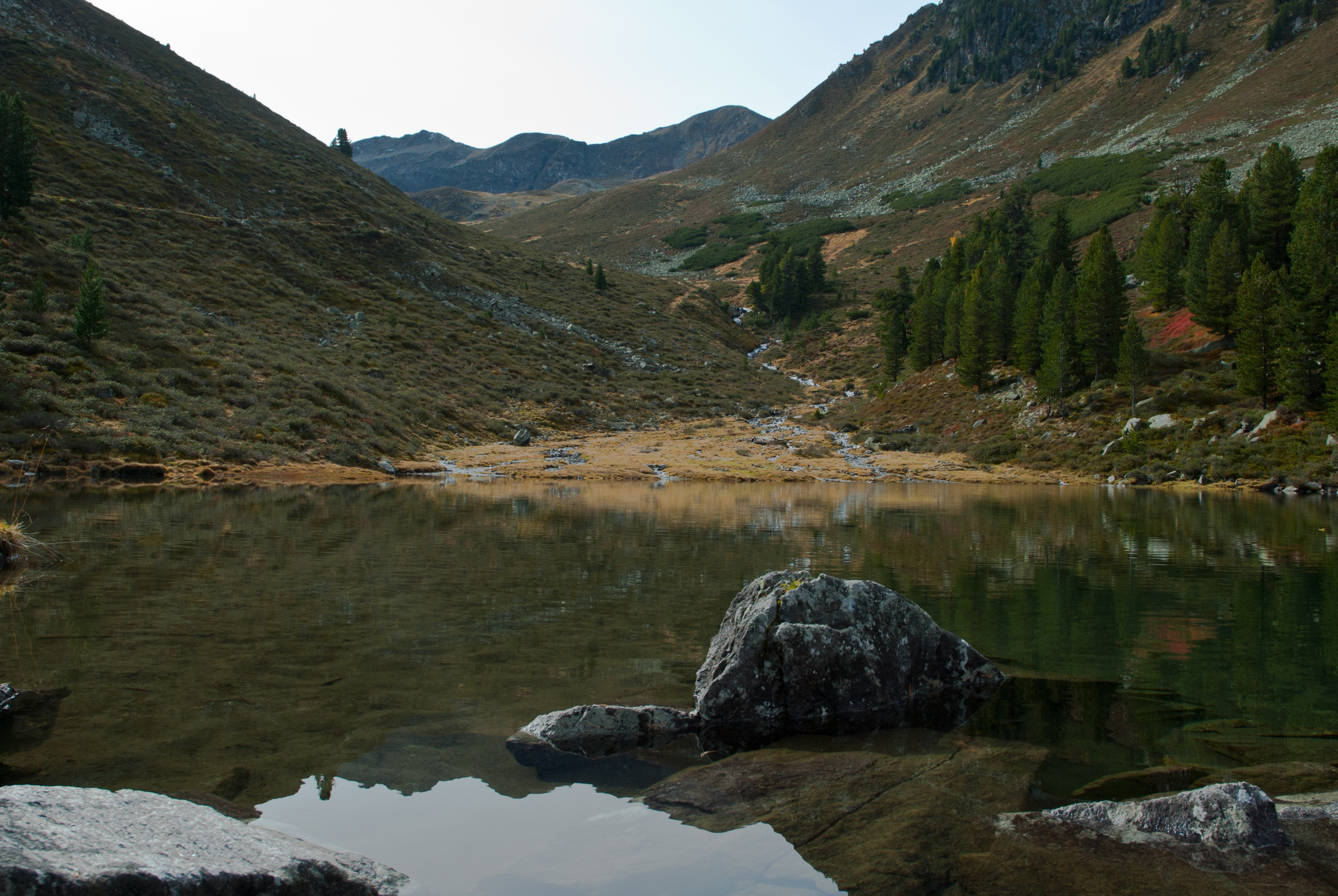 Blick vom Puchersee oder Pochersee im Wörgetal in Richtung Talschluss mit dem Wetterkreuzkogel